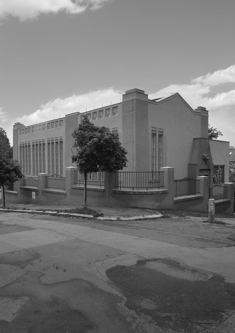 Ateliér Ladislava Šalouna Akademie výtvarných umění v Praze